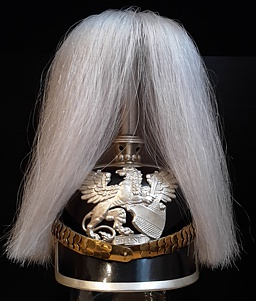 Helm Badische Dragoner mit Parade-Haarbusch um 1911. Chrakteristisch für Dragonerhelme: Eckige Helmschiene, Schuppenkette.